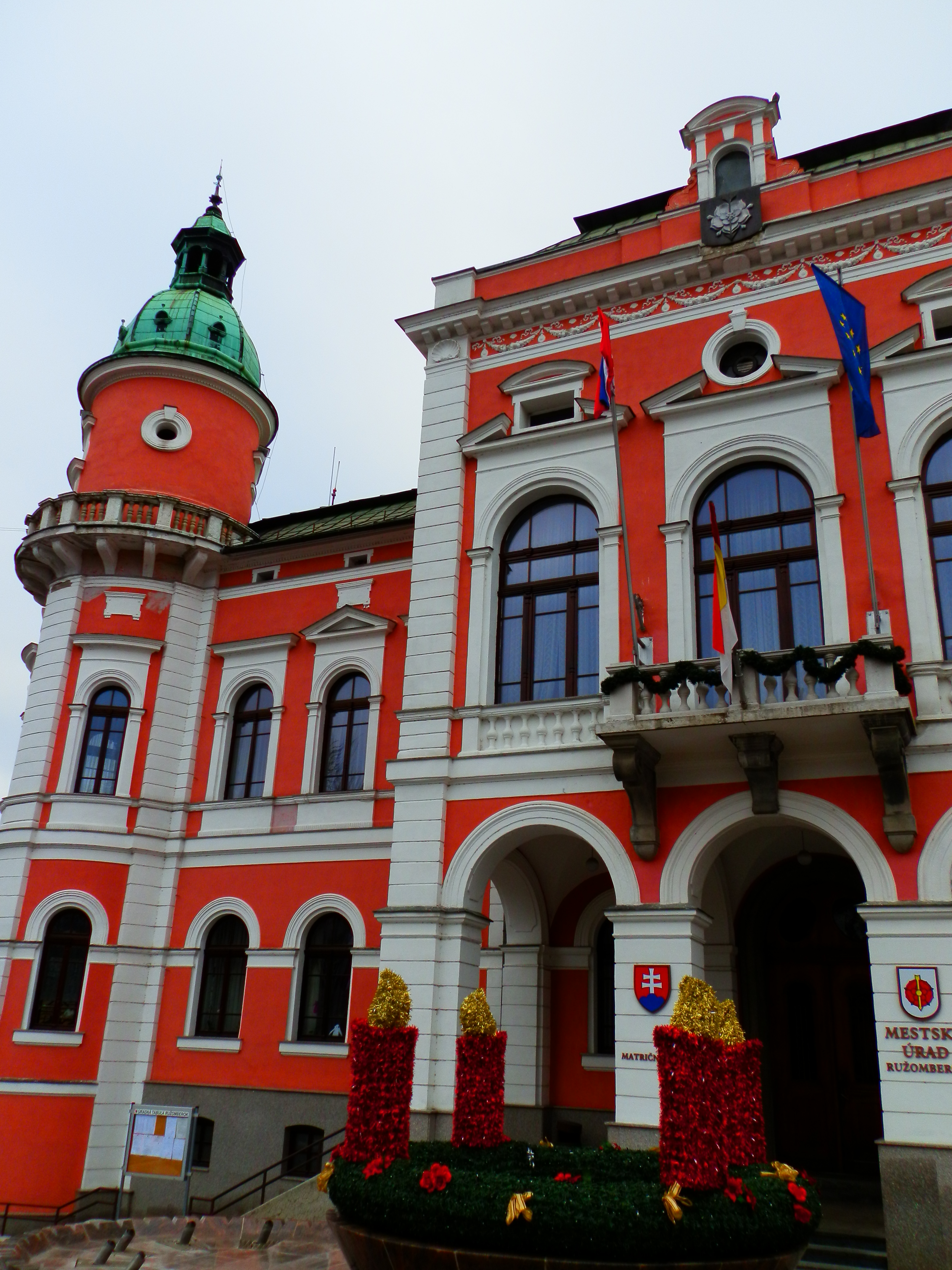 Mestský úrad, Ružomberok